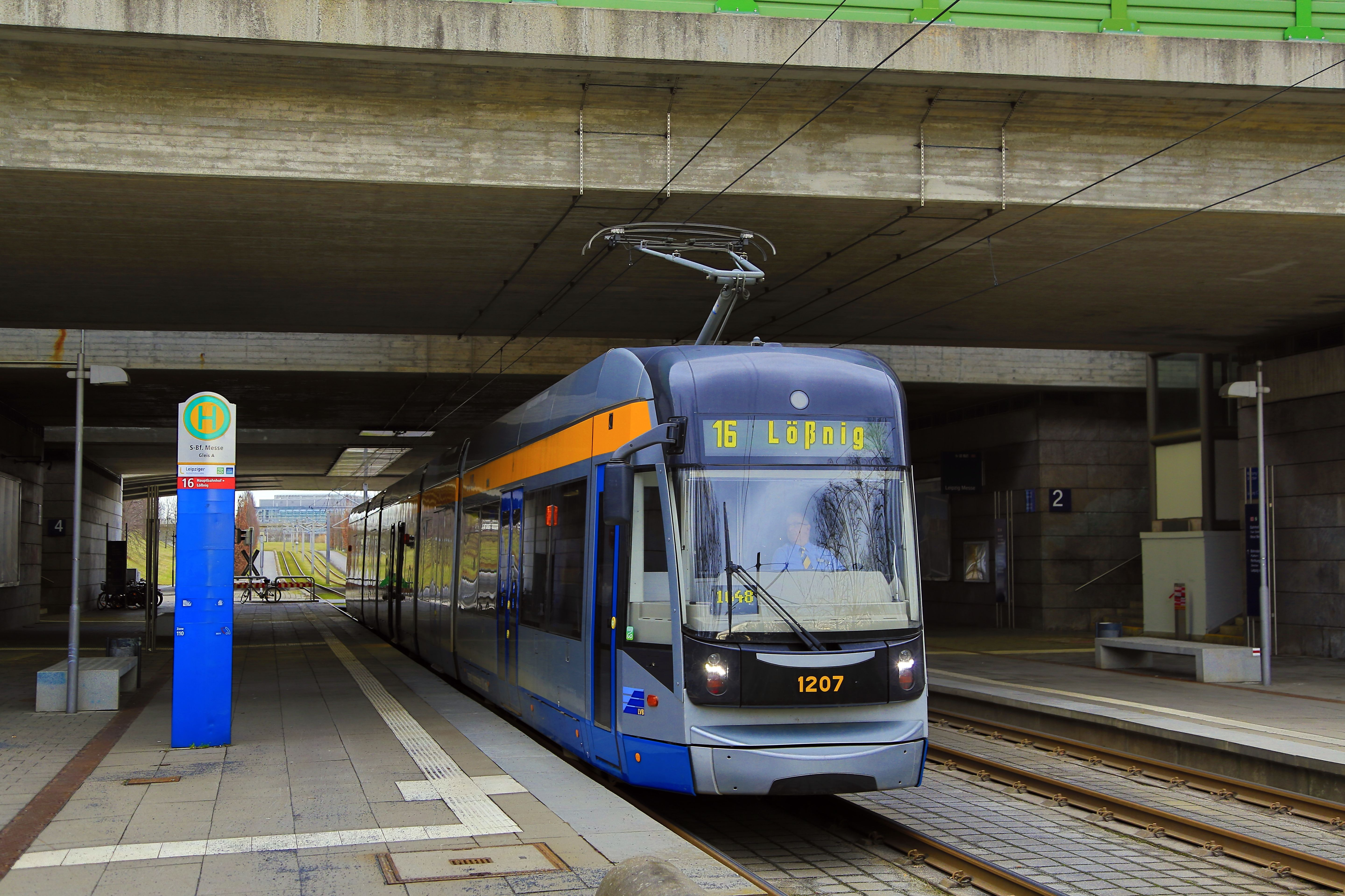 Zug der Linie 16 nach Lößnig am Bahnsteig unter den Brücken mit den Bahnsteigen des Fernbahhnhofes. Ein offizieller Reisendenübergang besteht auf dieser Seite nicht, doch hält das nur gehbehinderte Nutzer auf.